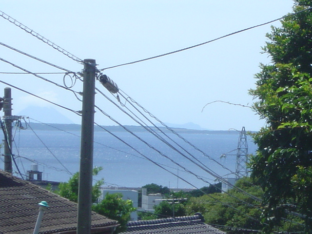 左・硫黄島と右・竹島